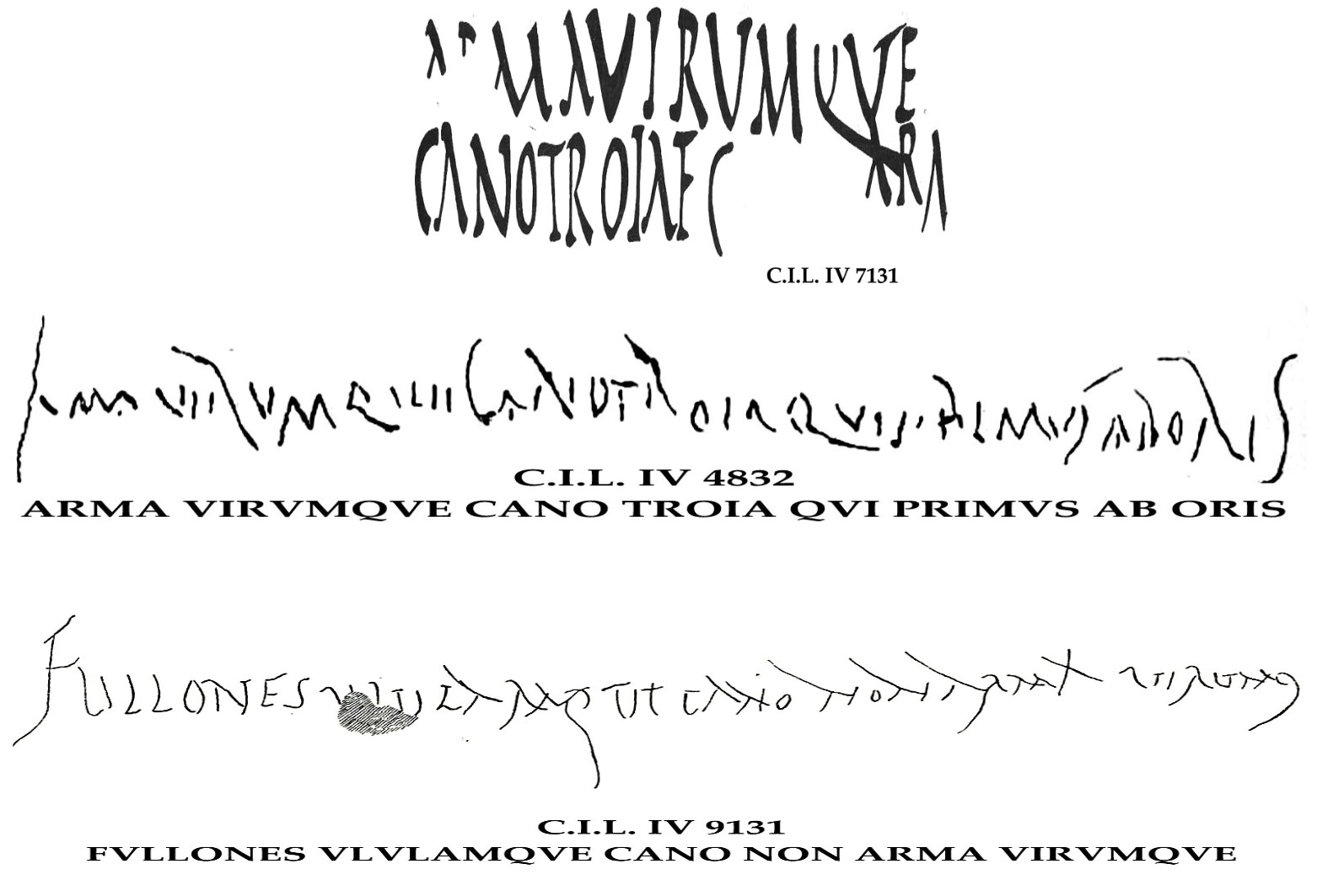 Inscripción pompeyana